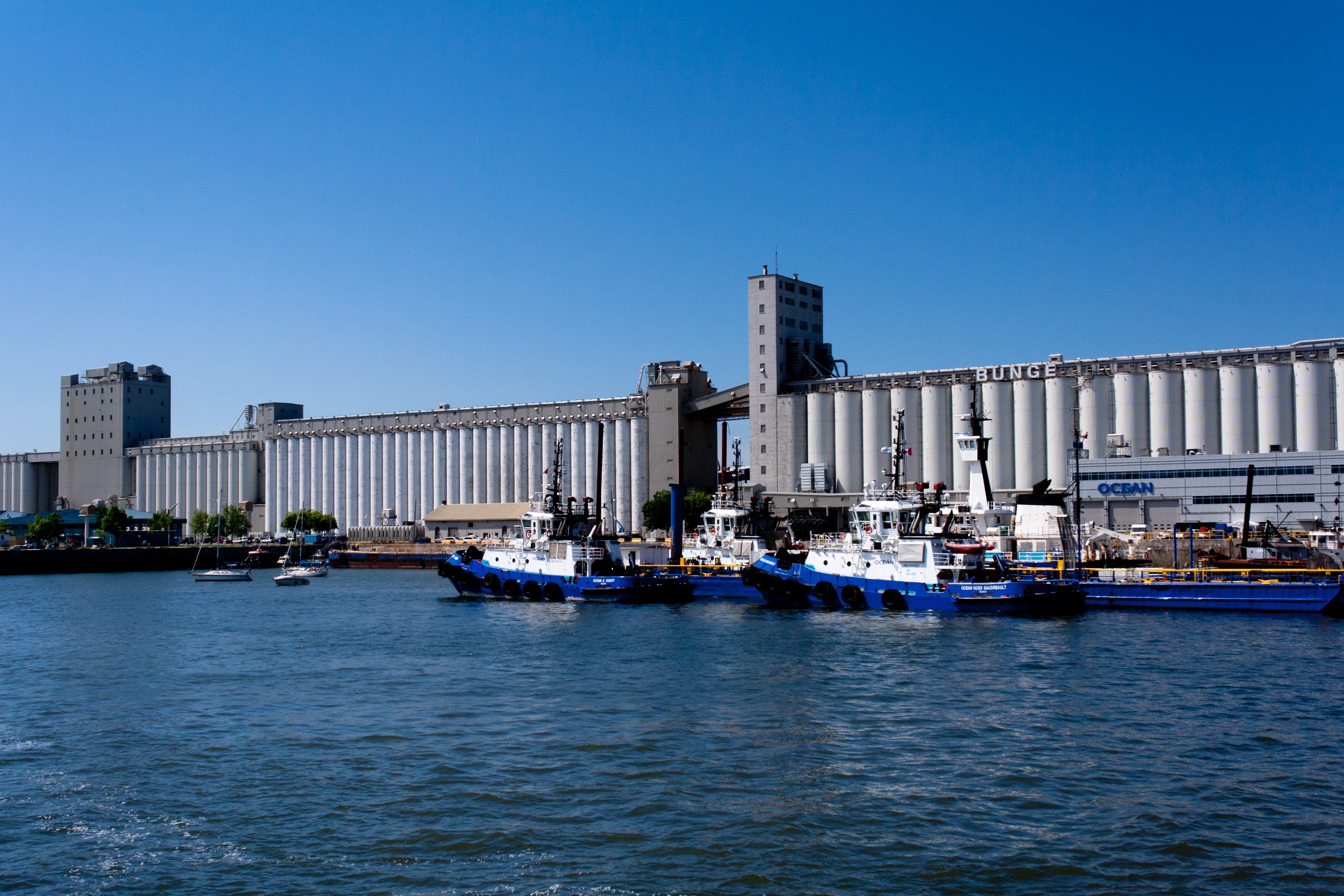 Bassin extérieur du Bassin Louise